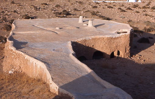 Ghardaïa, Algérie : mosquée Ammi Saïd